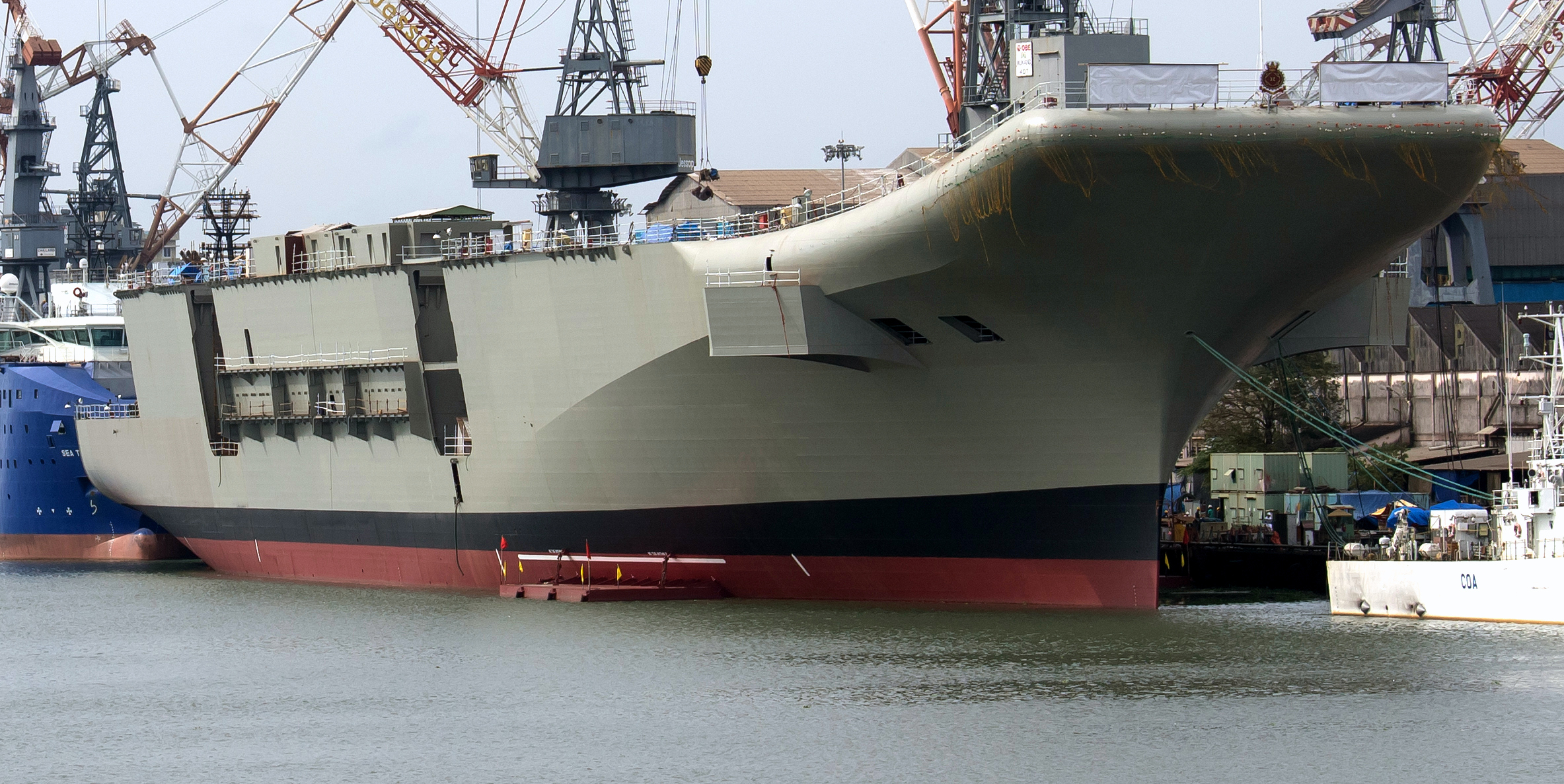 ഐ.എൻ.എസ്. വിക്രാന്ത് കൊച്ചി കപ്പൽ ശാലയിൽ